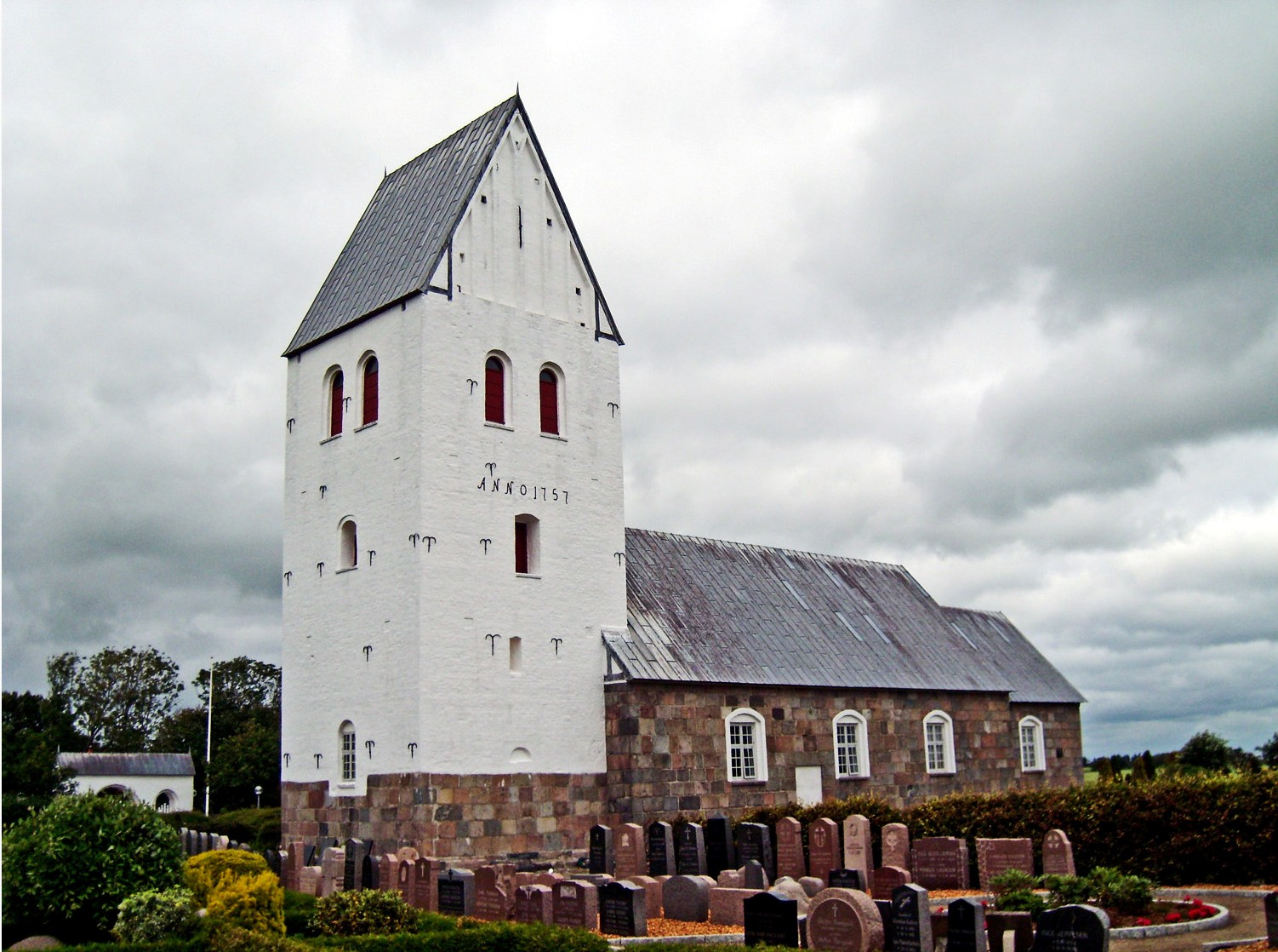 fra sydvest